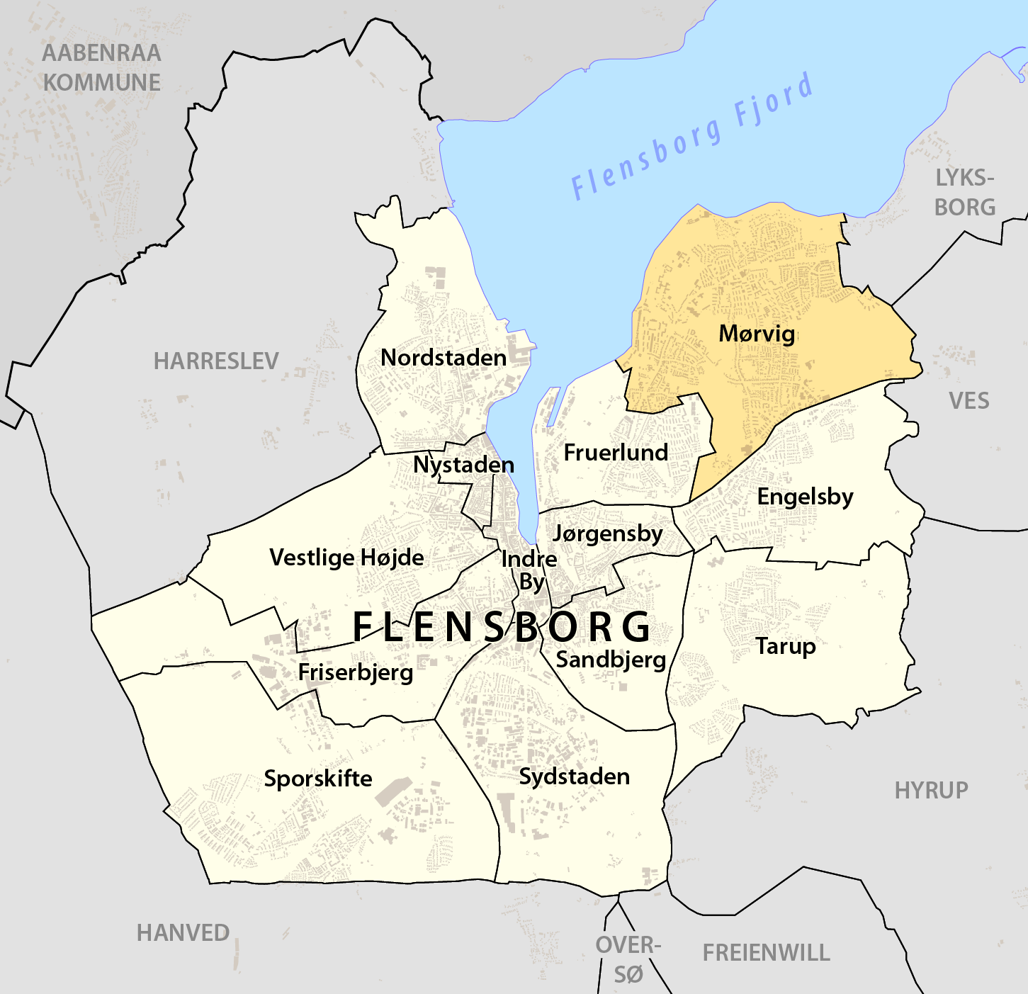 Beliggendhed af Mørvig i Flensborg Kommune